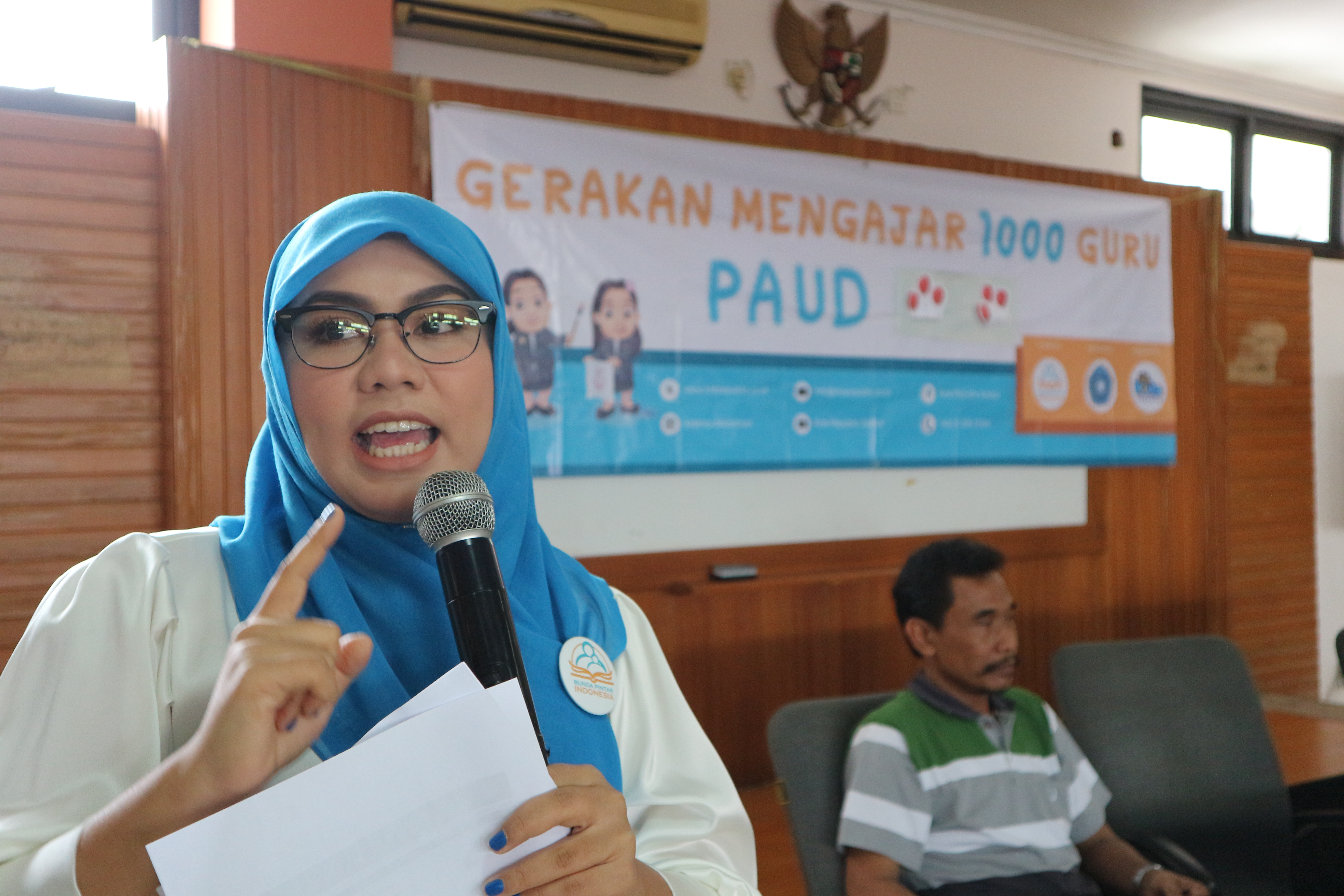 Zita Anjani, Gerakan Mengajar 1000 guru, 2016